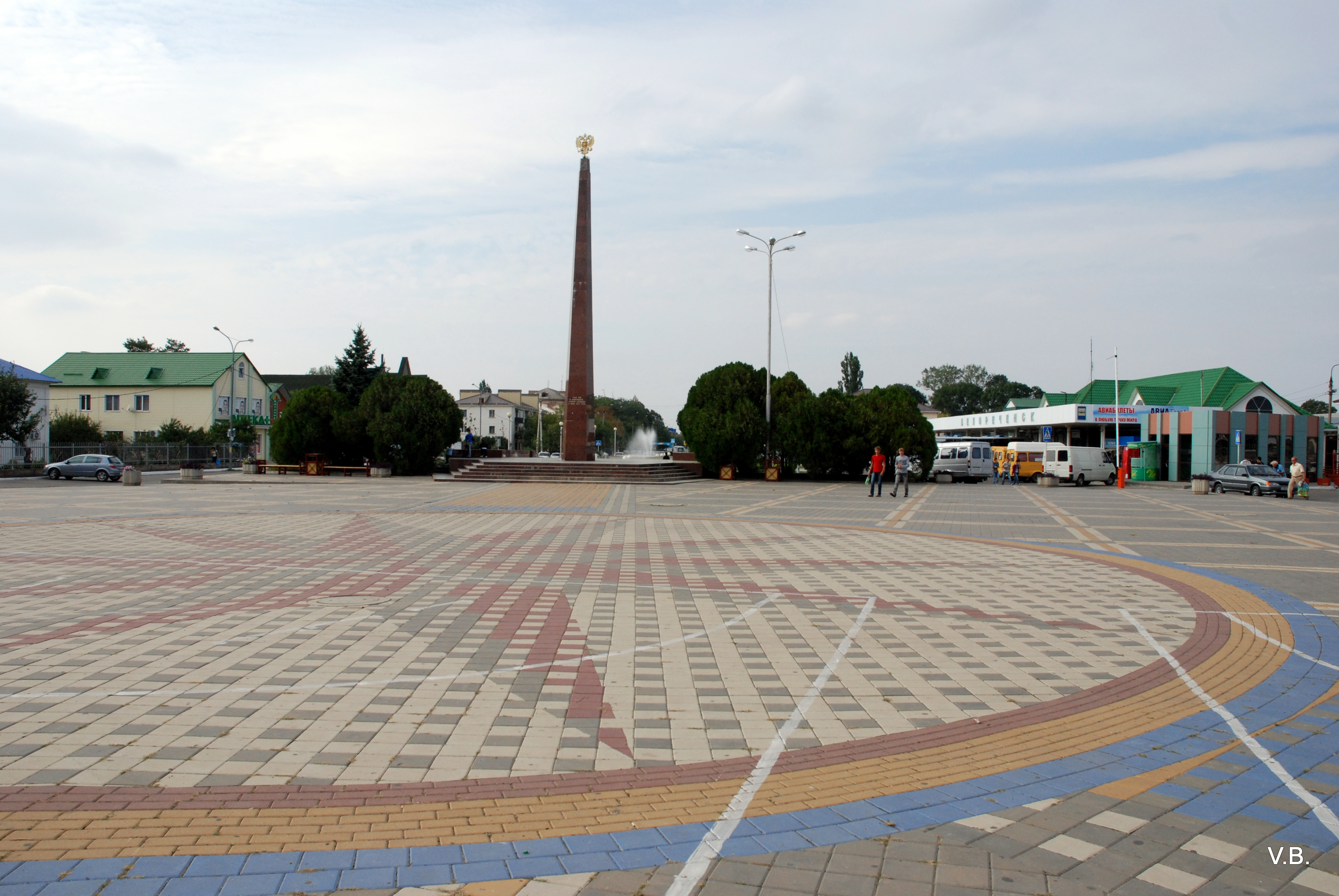 Центральная площадь. Фото Виктора Белоусова.